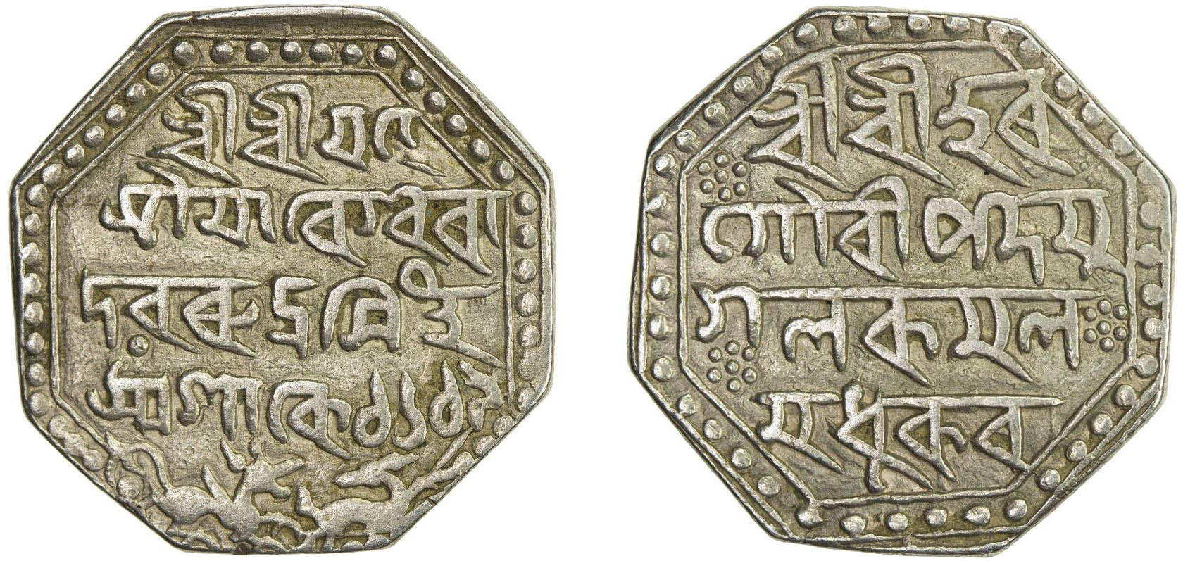 অসমীয়া: Rudra Singha Rupee Coin (Lion & Deer)